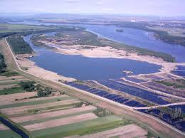 Српски (ћирилица): Рудник Ковин 2016